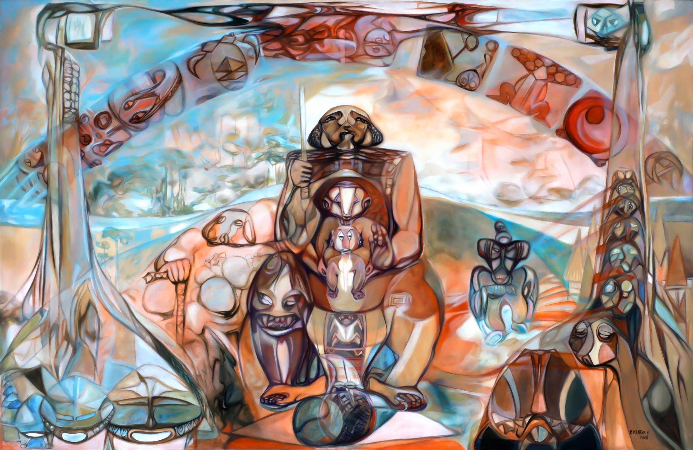 Technique mixte terre brute, acrylique sur toile Datée et signée 2008 en bas à droite